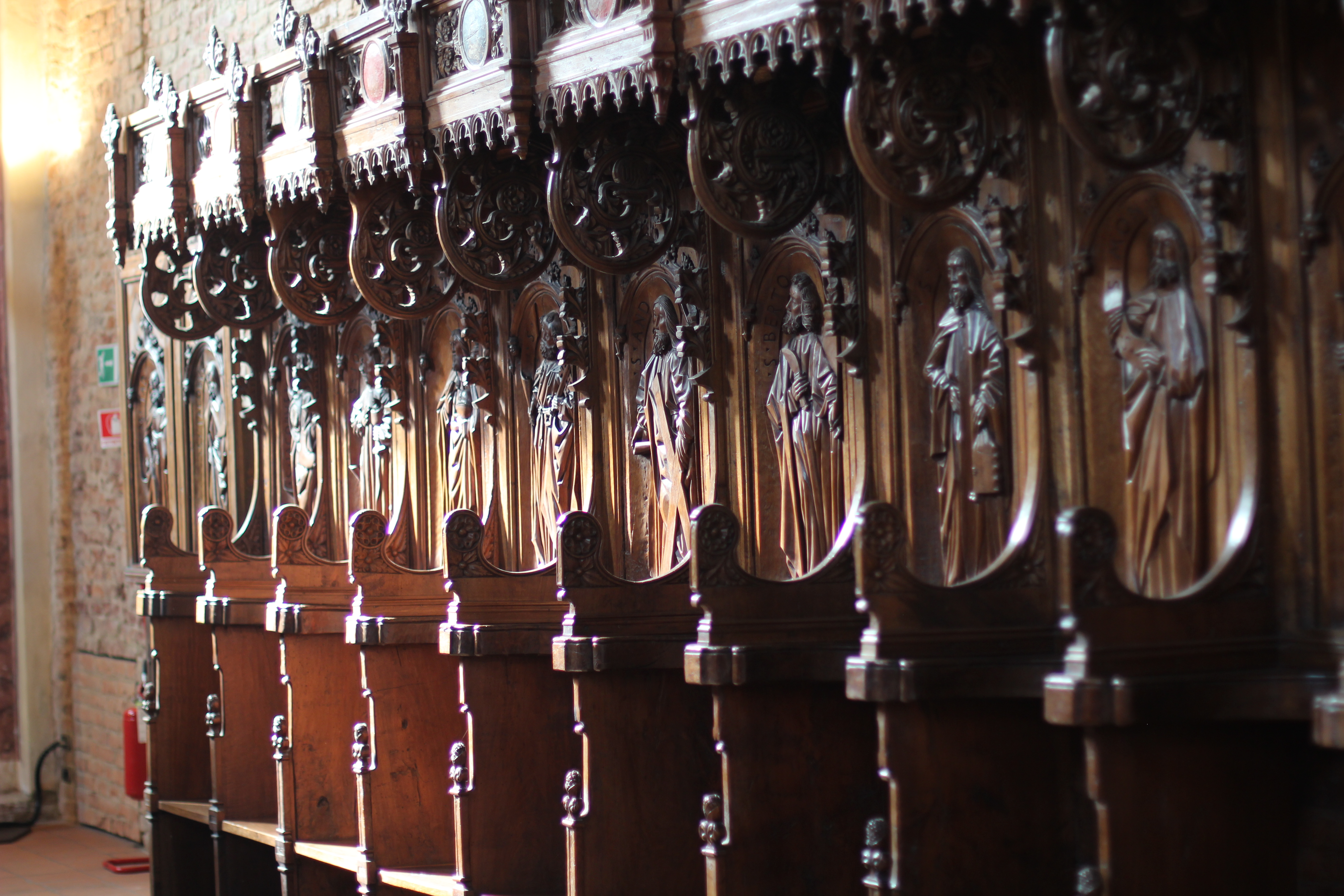 Coro ligneo di Baldino di Surso: legno intagliato e scolpito, 1477. Provenienza : Cattedrale di Asti; trasferito nella chiesa di San Giovanni con delibera del capitolo del 1767; dal 1950 nel museo civico di Palazzo Mazzetti. Restauro 2008 – 2010 : Fratelli Signini, Borgomanero, (NO); per le carte: Costantino Savio, Bioglio (TO); direzione lavori: Rossana Vitello, sopraintendenza per i beni storici, artistici ed etnoantropologici del Piemonte